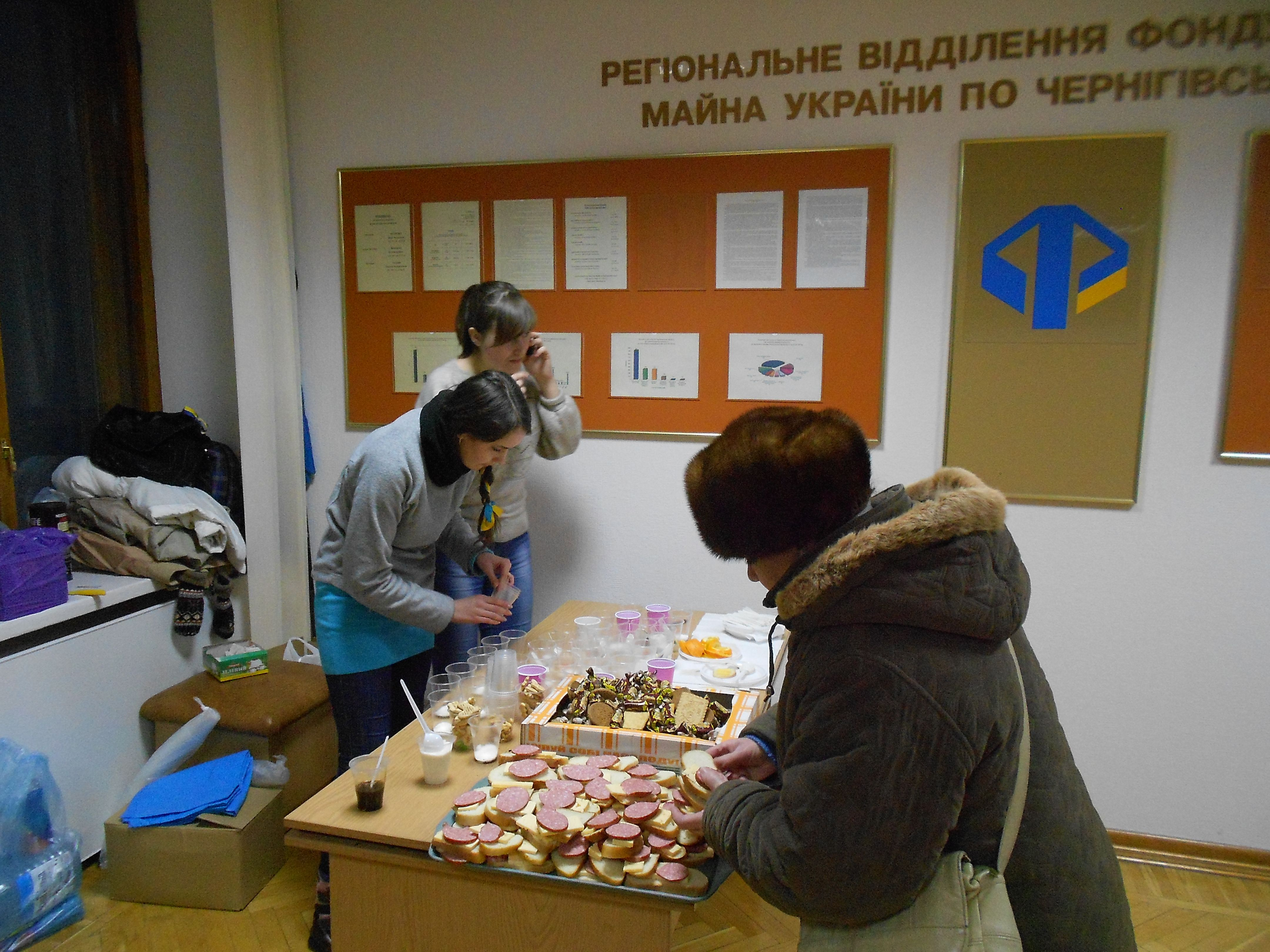 Чернігівська обласна рада 27 січня 2014 року. Євромайдан. Обід.